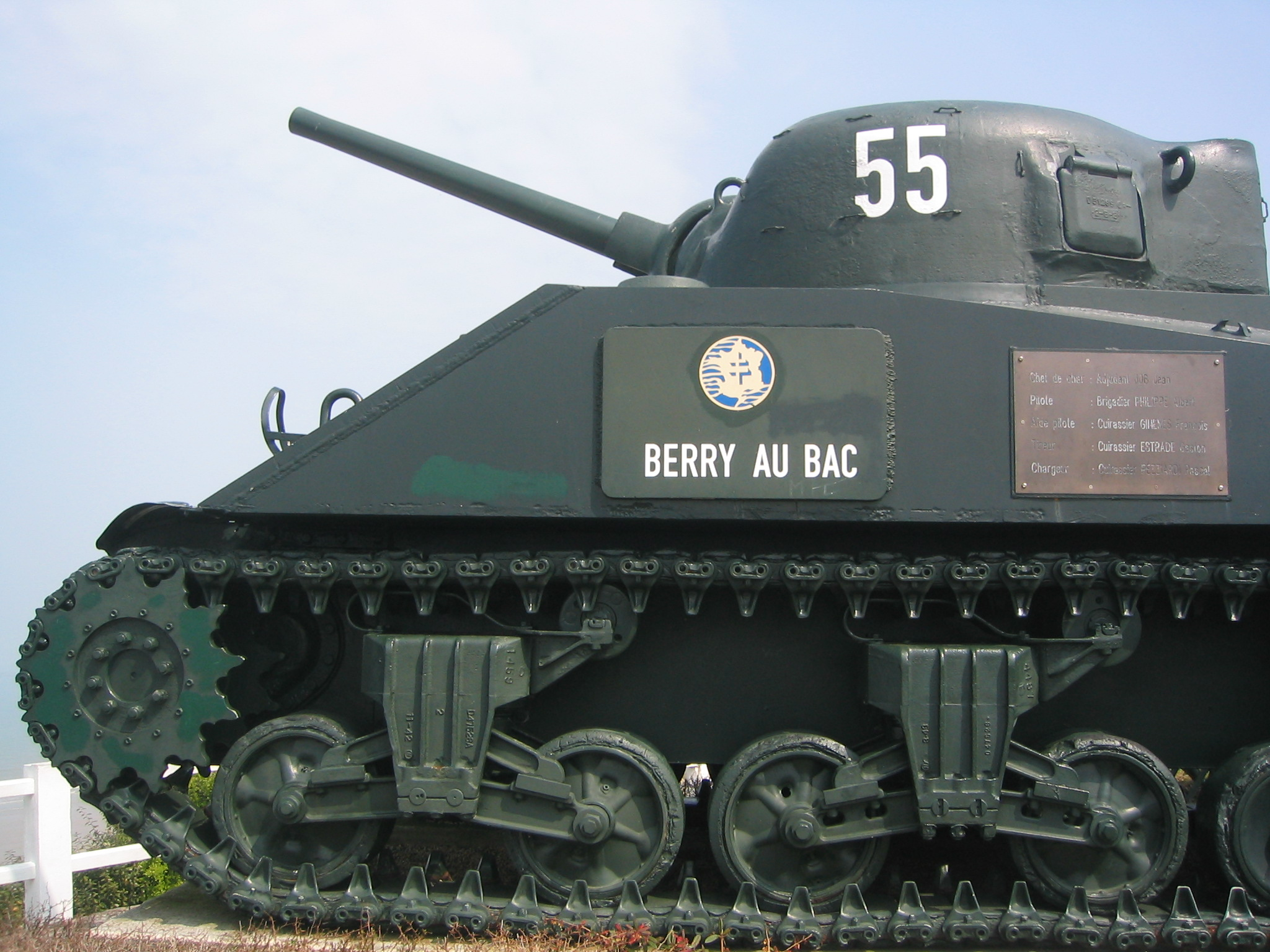 Char Sherman M4A2 "Berry-au Bac" exposé à Arromanches (Calvados, France) et ayant appartenu à la 2ème division blindée du général Leclerc (12e régiment de Cuirassiers, 4ème Escadron, 5ème peloton). Selon la plaque, les cinq membres d'équipage étaient : l'adjt. JOB, Bg PHILIPPE, Cuirassier GIMENES, Cuirassier ESTRADE et Cuirassier PEZZIARDI